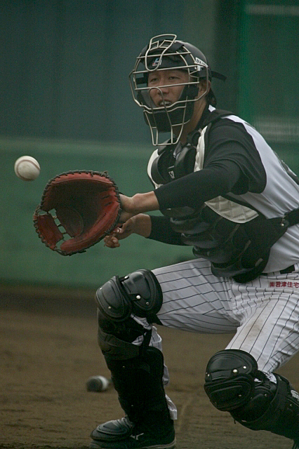 日本プロ野球 千葉ロッテマリーンズ 青松敬鎔捕手